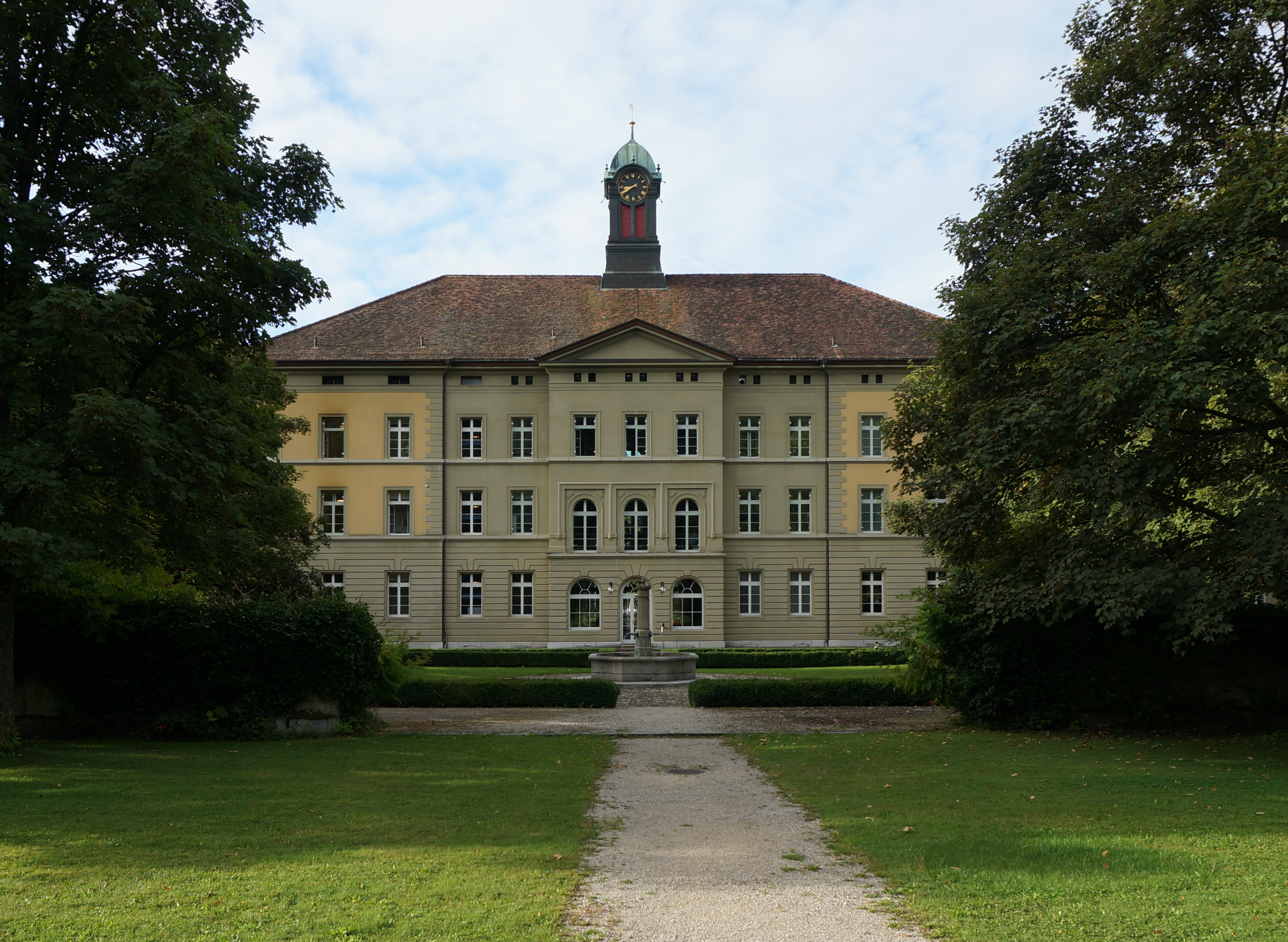 Heil- und Pflegeanstalt Waldau, Innenhof Zentralbau mit Hofbrunnen